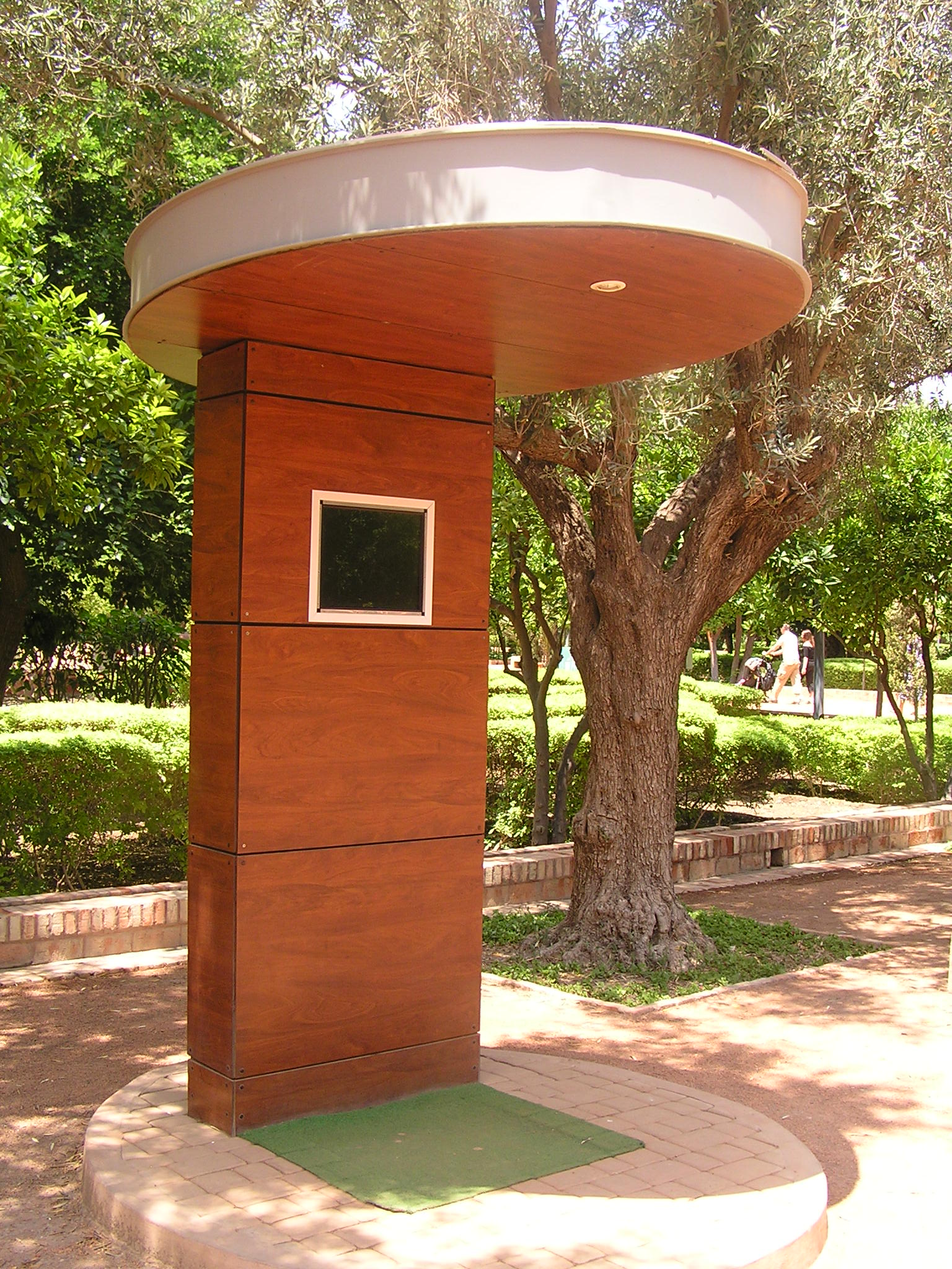 cyberparc Arsat Moulay Abdessalam de Marrakech